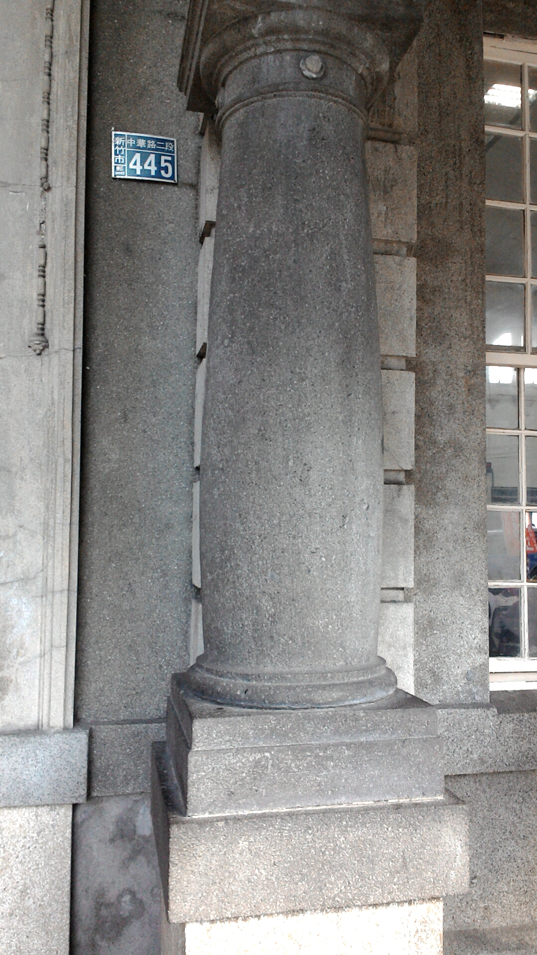 新竹車站玄關瓶狀圓柱，新竹市東區東門聯里榮光里